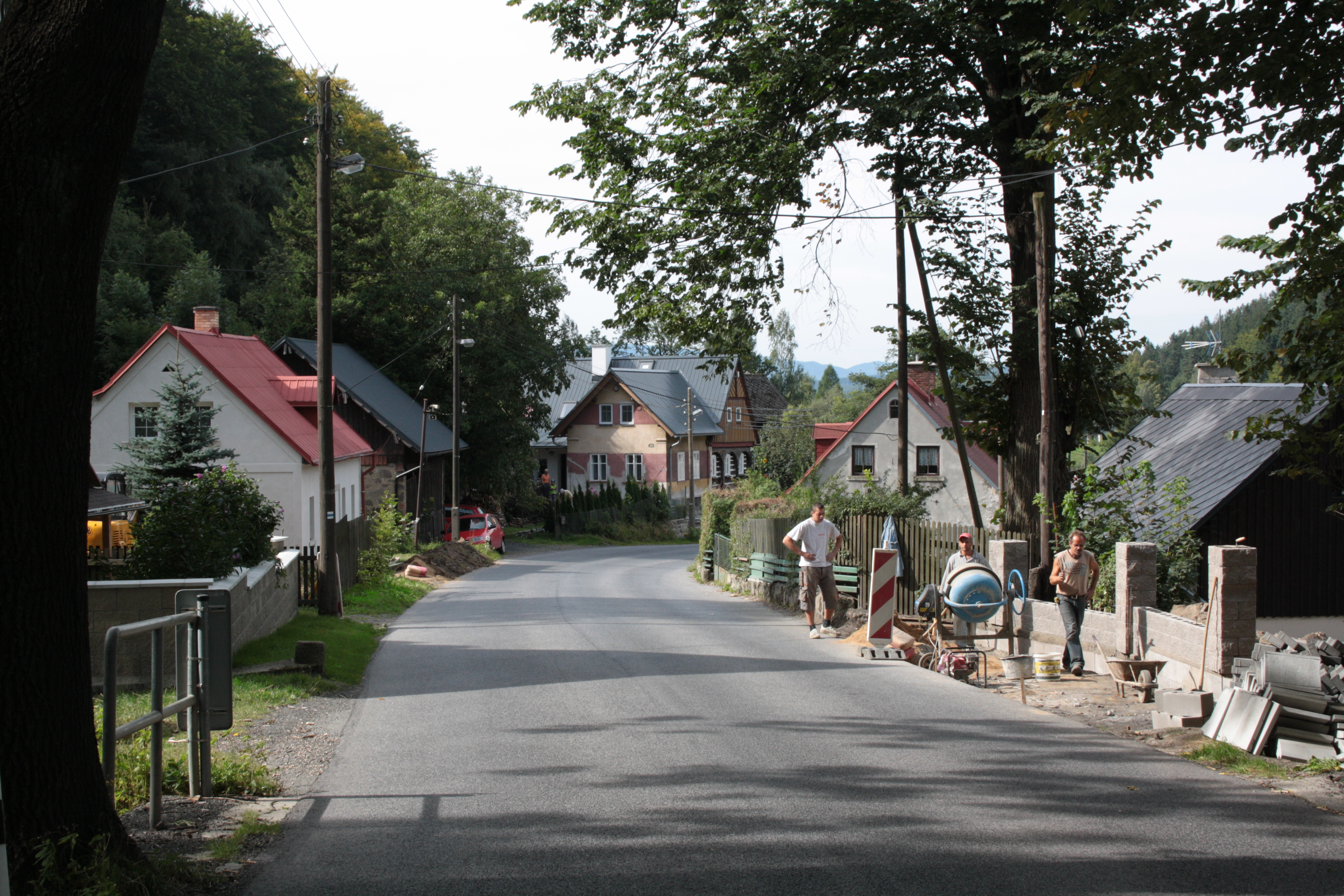 This photograph was taken with a DSLR from WMCZ's Camera grant. Silnice ve Filipce v Oldřichově v Hájích (směr na Mníšek).